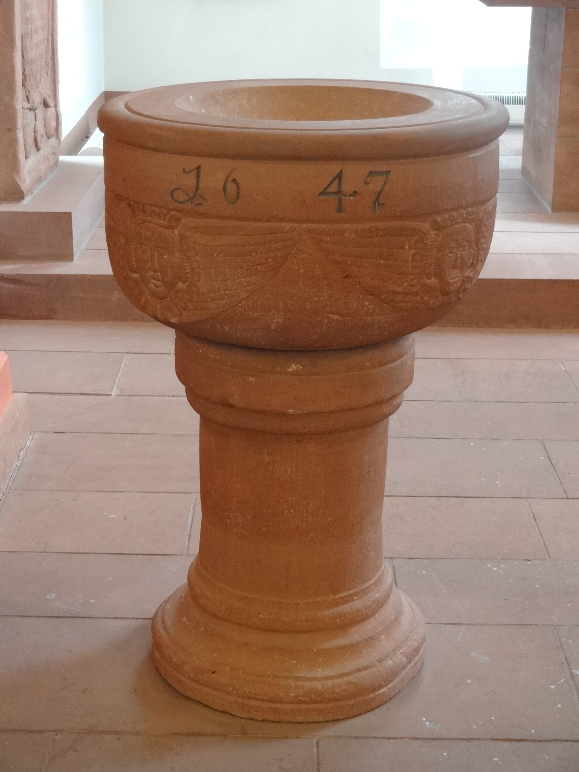 Stadtkirche zum Heiligen Geist (Nidda)